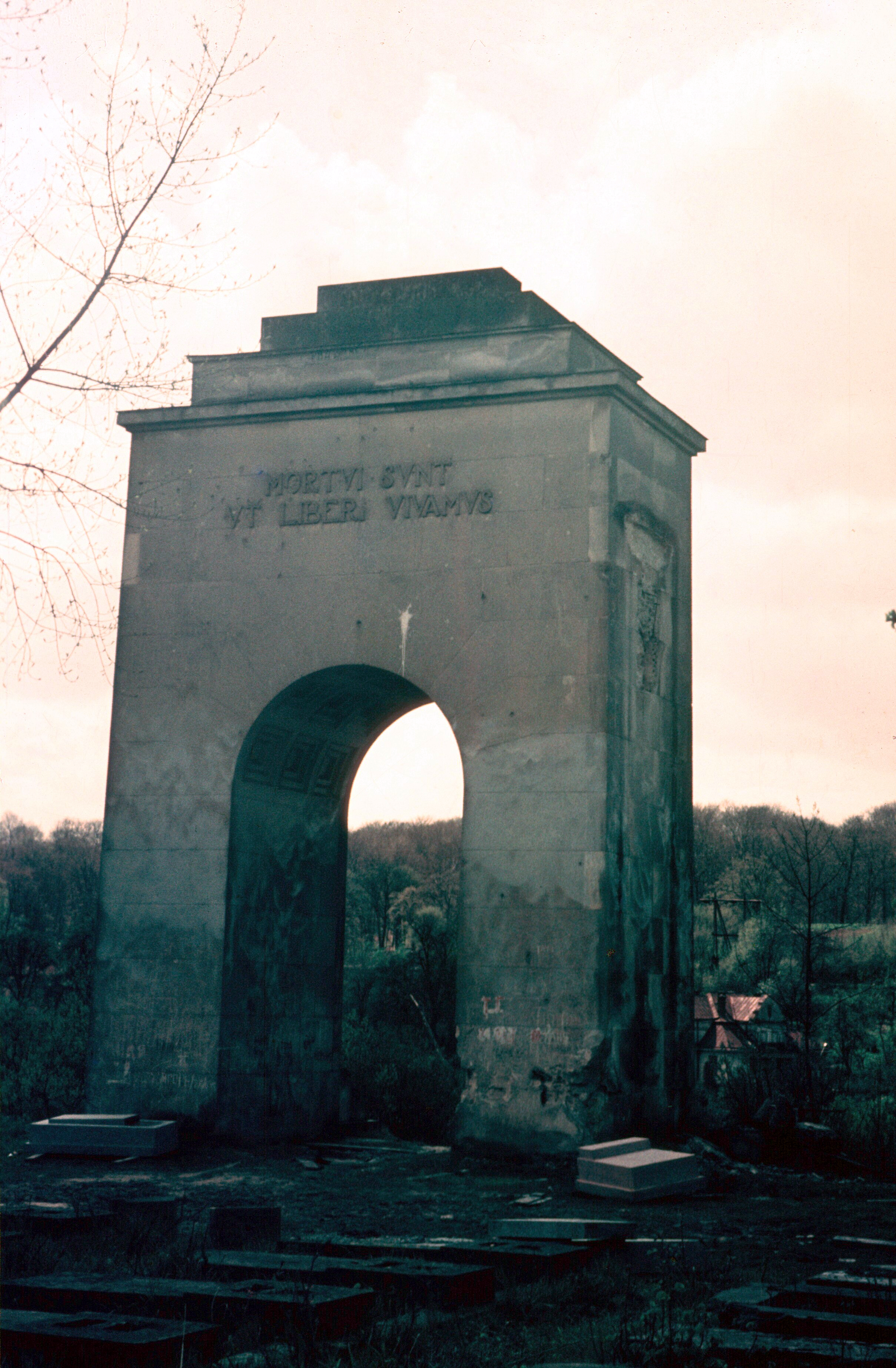 Zniszczony i zdewastowany Cmentarz Obrońców Lwowa. Stan w roku 1974.